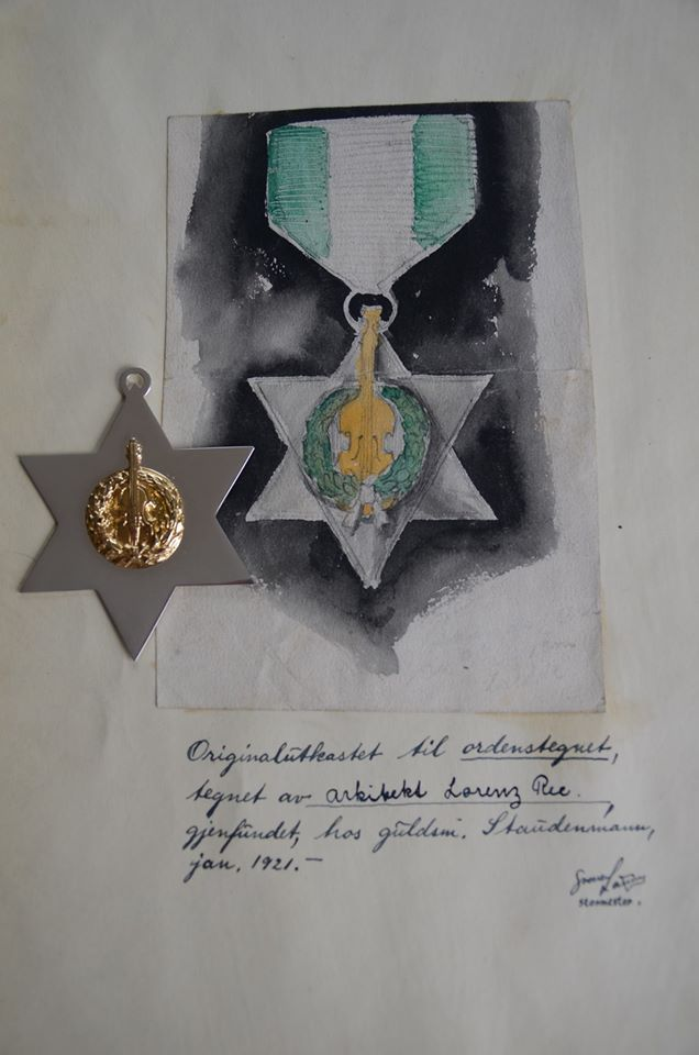 Ny medalje (ridder/kommandør) ved siden av originalutkastet. Foto: Claudia Bätcke